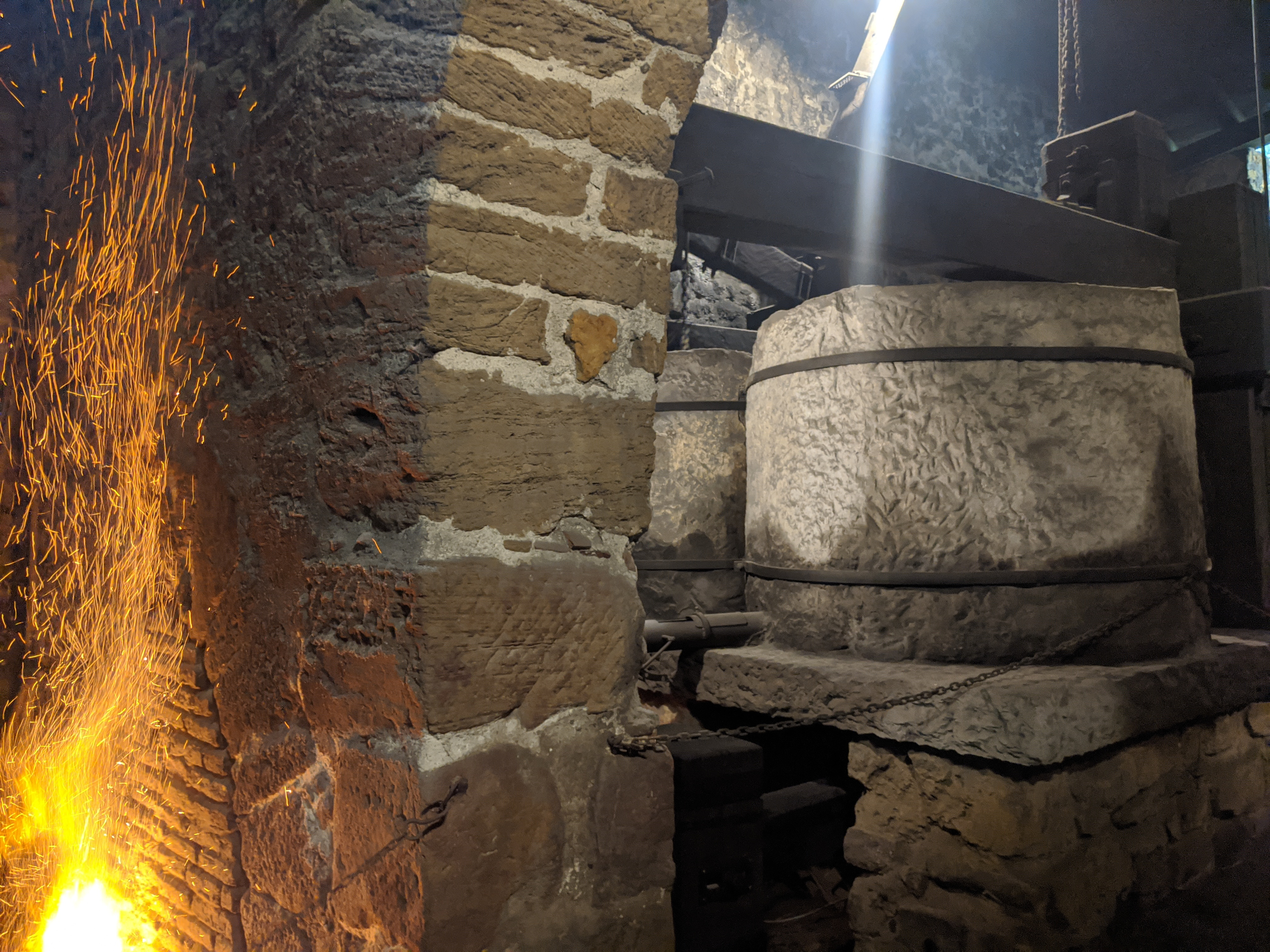 El Pobaleko burdinola Muskizko El Pobal auzoan dagoen burdinola da. Salazartarrek XVI. mendean eraiki zuten.